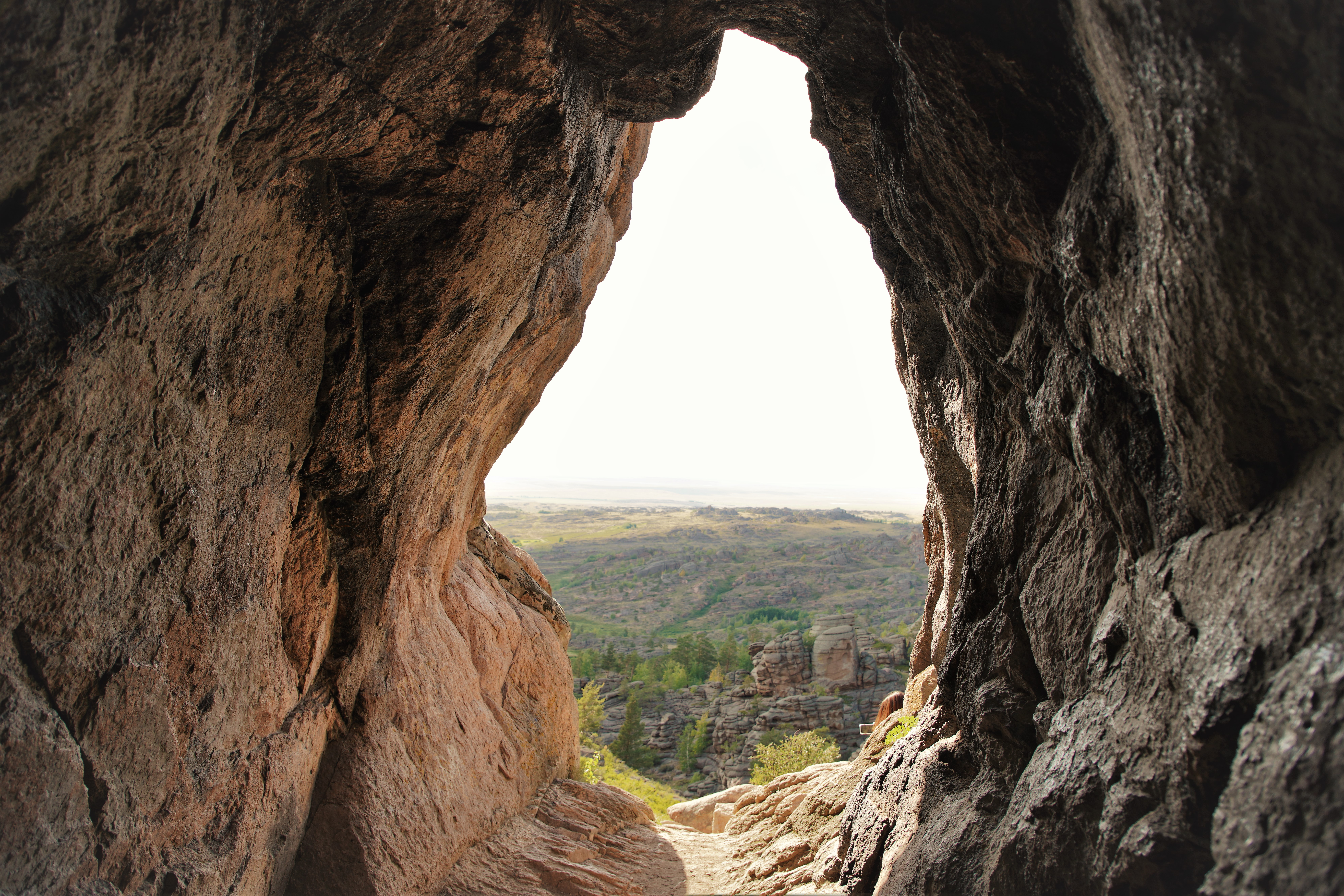 Пещера Коныр-Аулие, Баянаульский национальный парк